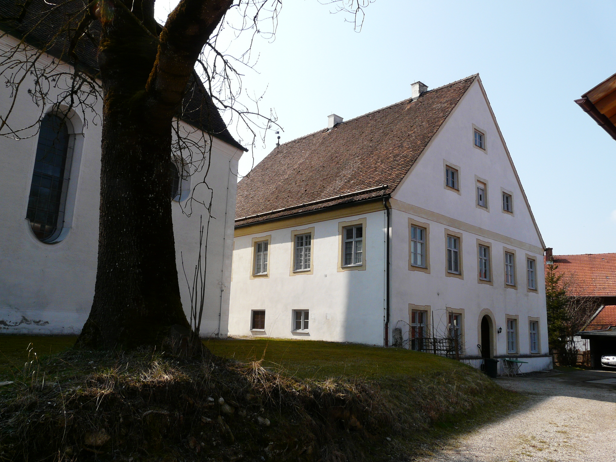 Pfarrhaus in Eberfing